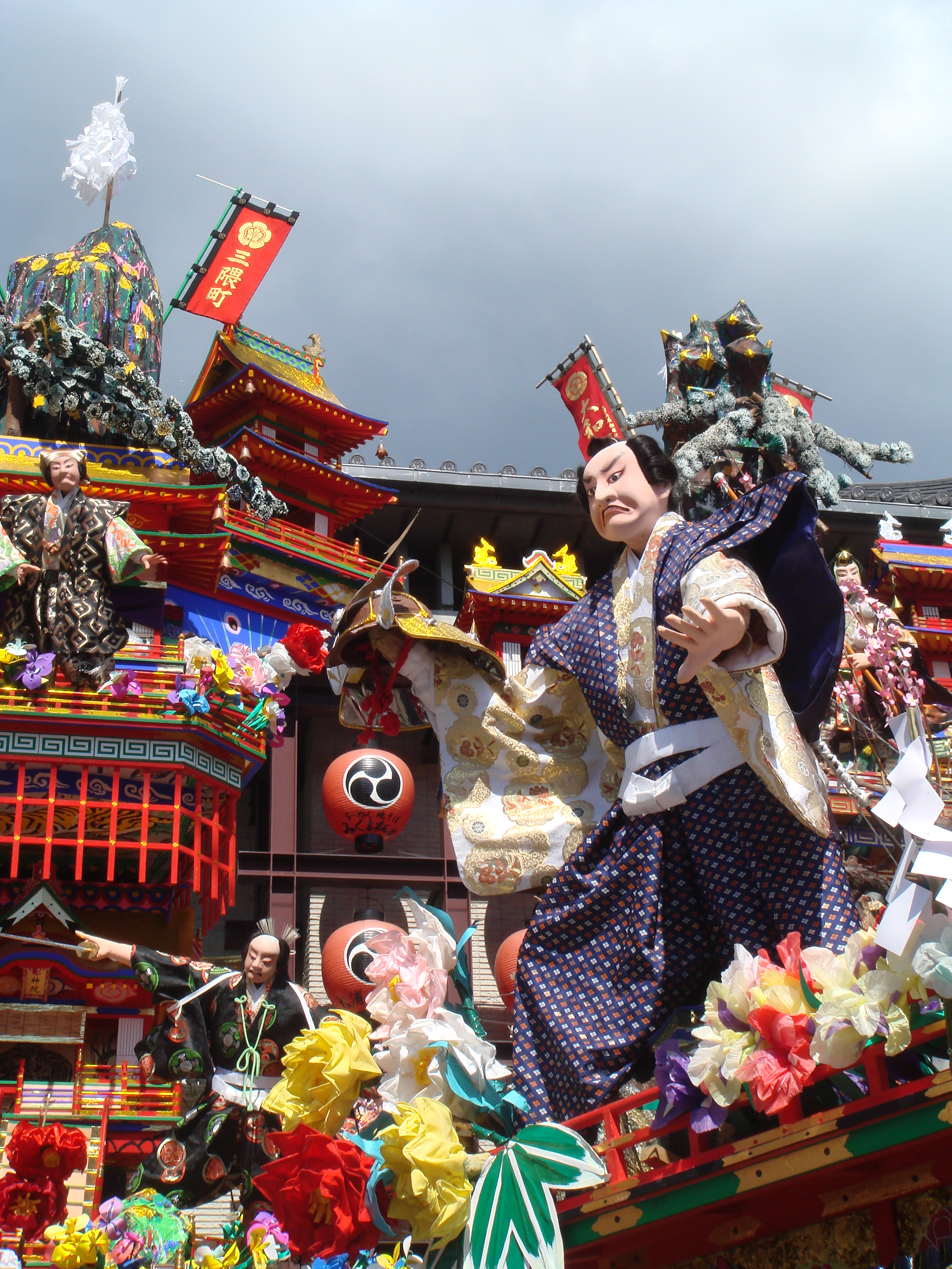 日田祇園祭りの様子。左奥が三隈町山鉾（Mikuma）、右奥が大和町山鉾（Yamato）、右手前が川原町山鉾（Kawahara）である。